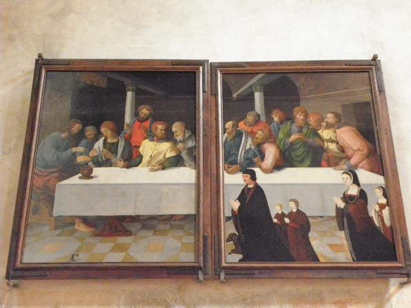 La Cène : volets d'un triptyque de 1623 conservé en la co-cathédrale de Bourg-en-Bresse (01)